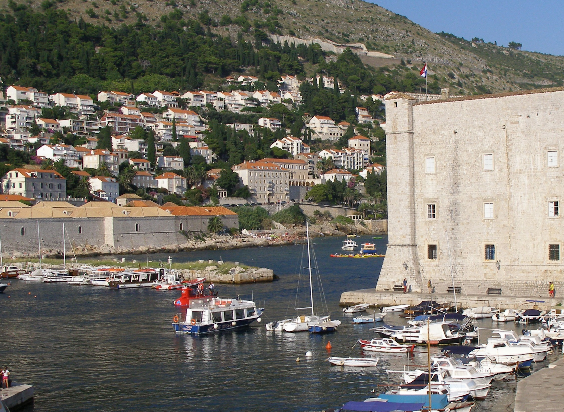 Dubrovnik: links die Quarantänestation Lazareti, davon der Wellenbrecher Kaše (von Stadtmauer fotografiert)